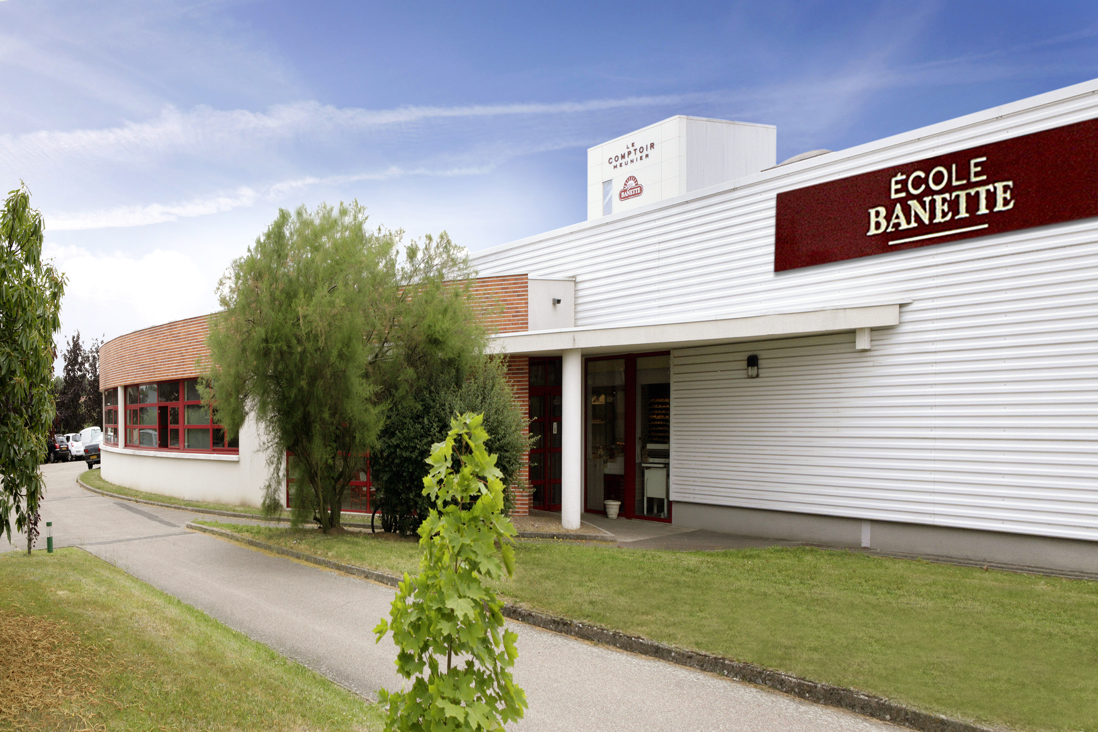 École Banette proposant une formation boulangerie en six mois.